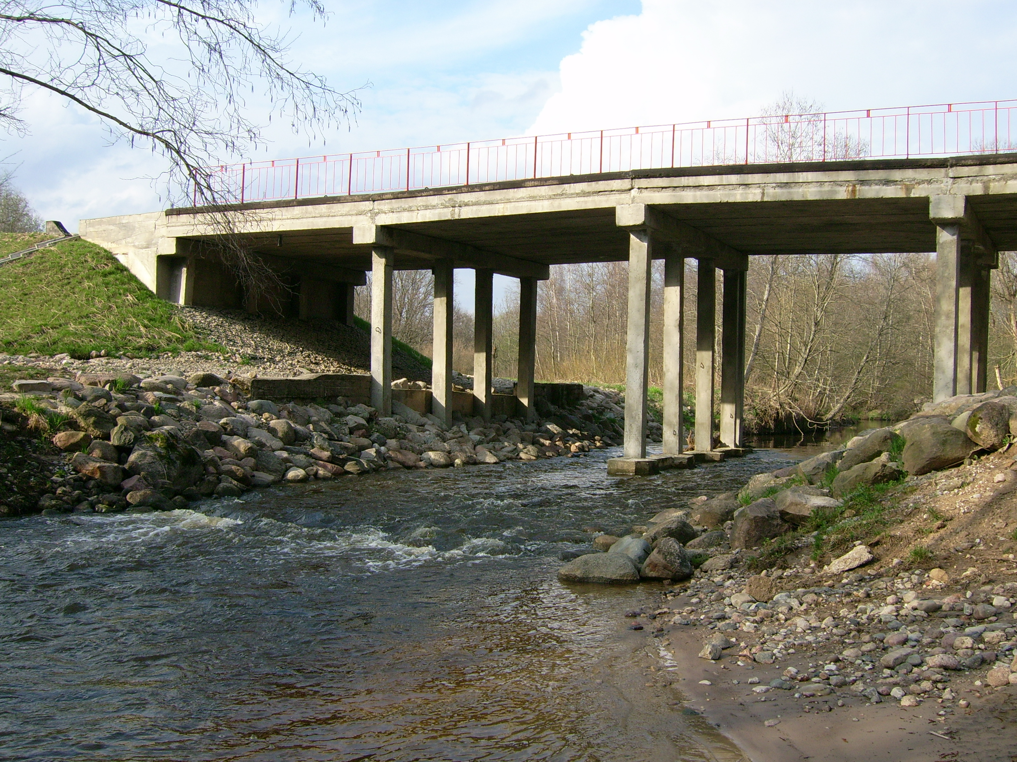 Šunija